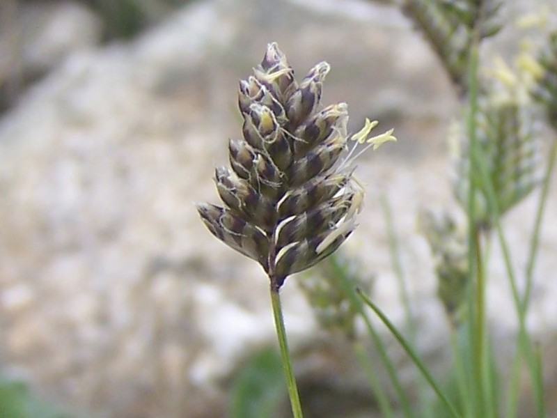 Oreochloa disticha (pl. boimka dwurzędowa), habitat:Tatra Mountains - Czerwone Wierchy